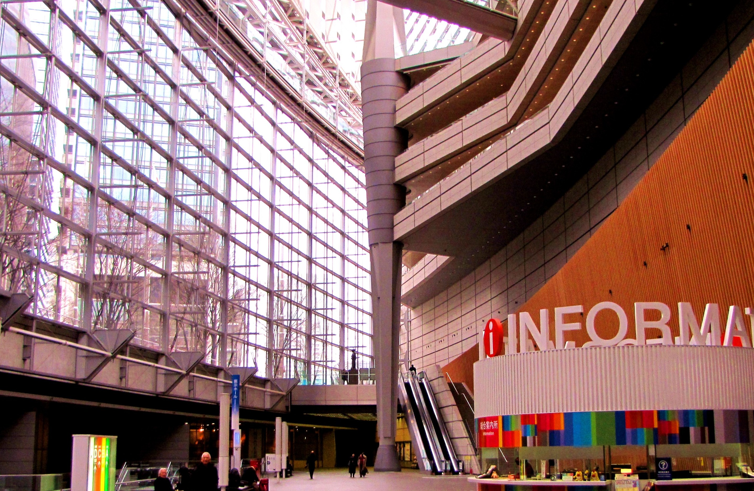 Tokyo Forlum 東京フォーラム